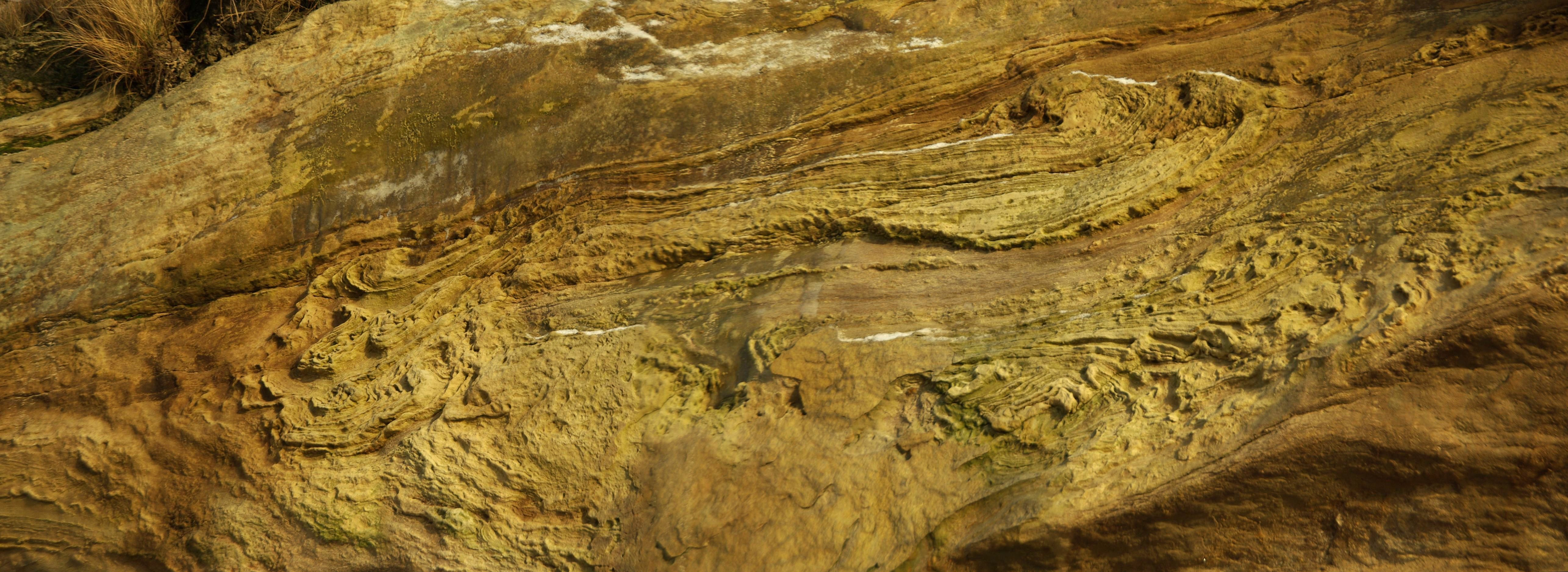 Ninamaa panga liivakivi pank on omapärane-väänatud,muljutud ja kurdudesse surutud,meenutades pigem mingit abstraktset kunstiteost.